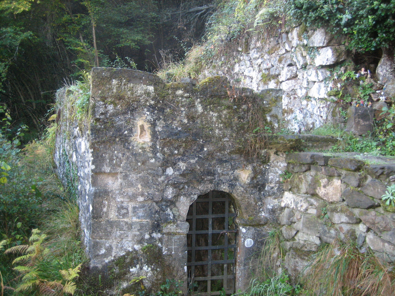 Foto de una de las ermitas del Monasterio de Santo Toribio de Líebana en Camaleño (Cantabria, España)